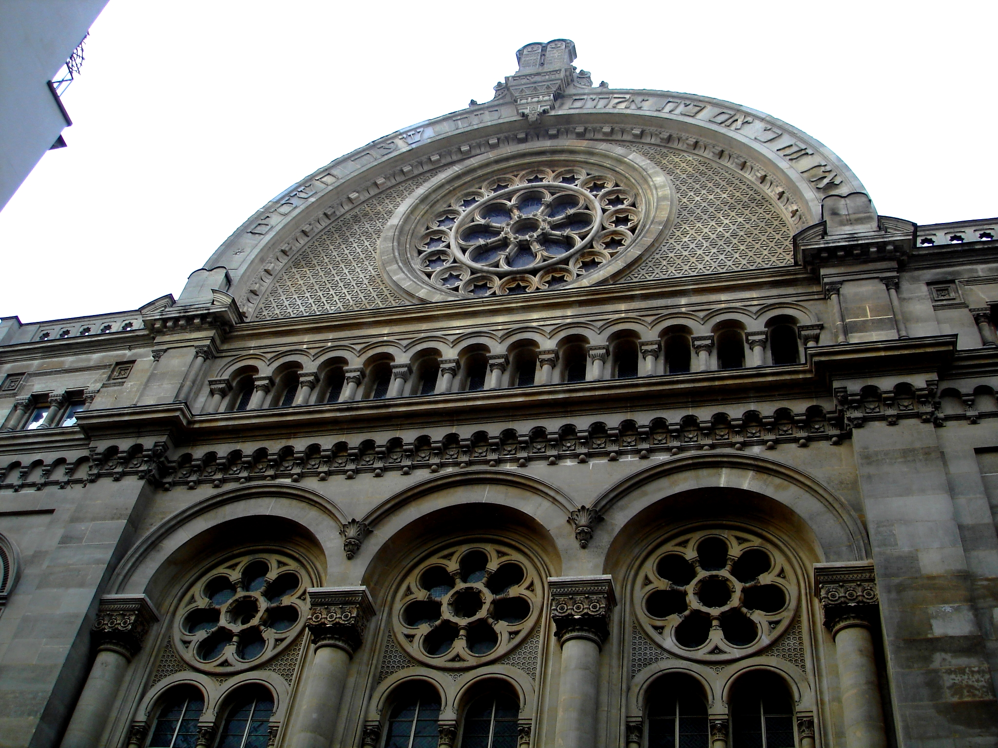 Grande synagogue de la Victoire à Paris. Sur le fronton est inscrit en hébreu le verset biblique Genèse 28:17 : "Ce [lieu] n'est autre que la maison de D.ieu, Et c'est la porte du ciel."